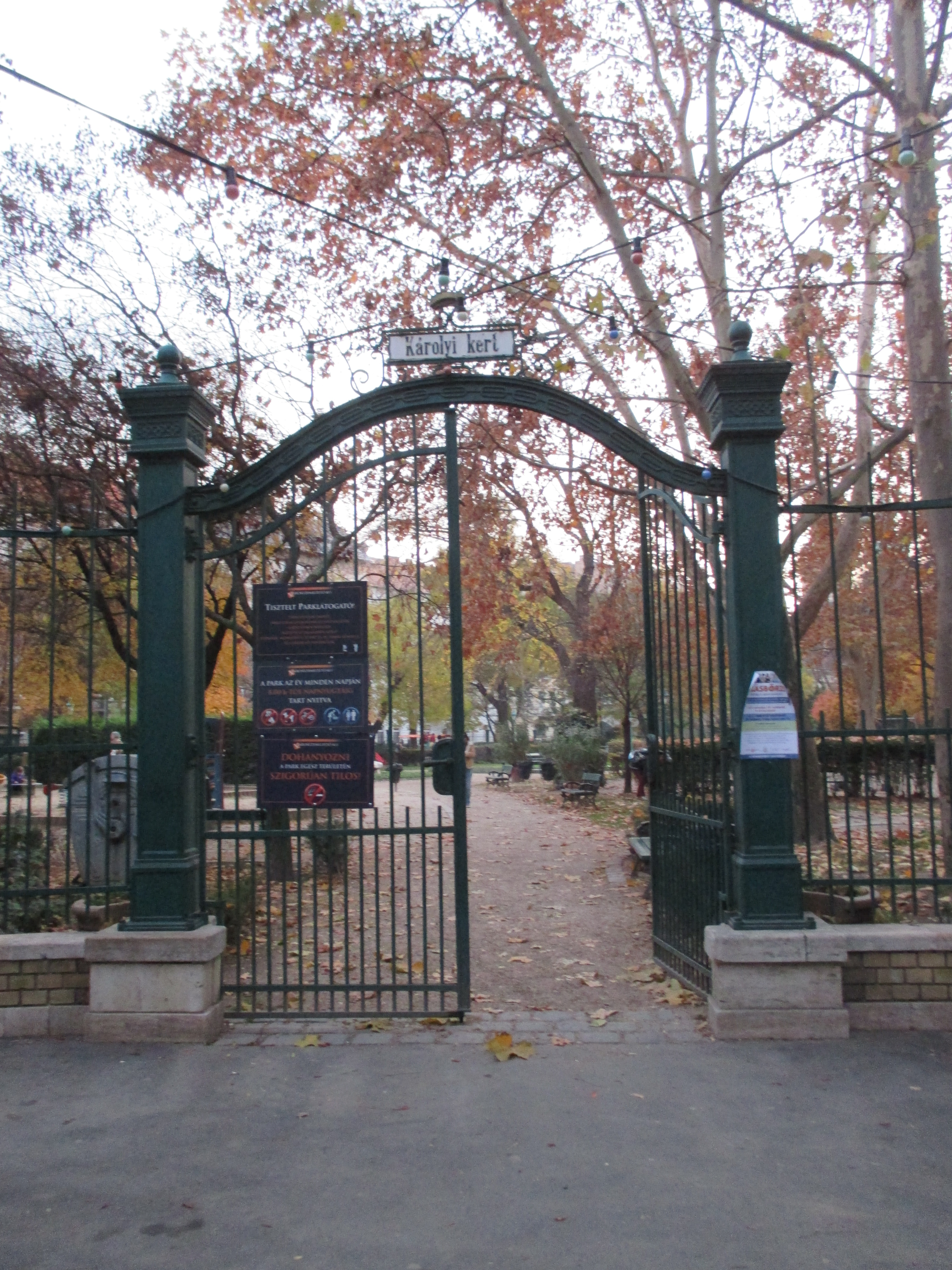 A Károlyi-kert Magyar utca-Ferenczy utca sarkán lévő bejárata 2015 novemberében (Budapest, V. ker.)